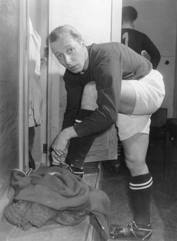 ADN-ZB/Wendorf/Beyer 16.11.1957 SC Wismut Karl-Marx-Stadt siegt mit 1:0 Im Berliner Friedrich-Ludwig-Jahn-Stadion siegte am 16.11.1957 der SC Wismut Karl-Marx-Stadt über den ASK Vorwärts mit 1:0 Toren UBz. Der Nationalspieler Manfred Kaiser (SC Wismut Karl-Marx-Stadt) beim Anziehen.